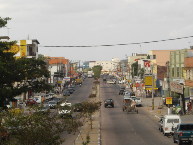 Avenida Presidente Getúlio Vargas do munícipio de Alvorada - RS